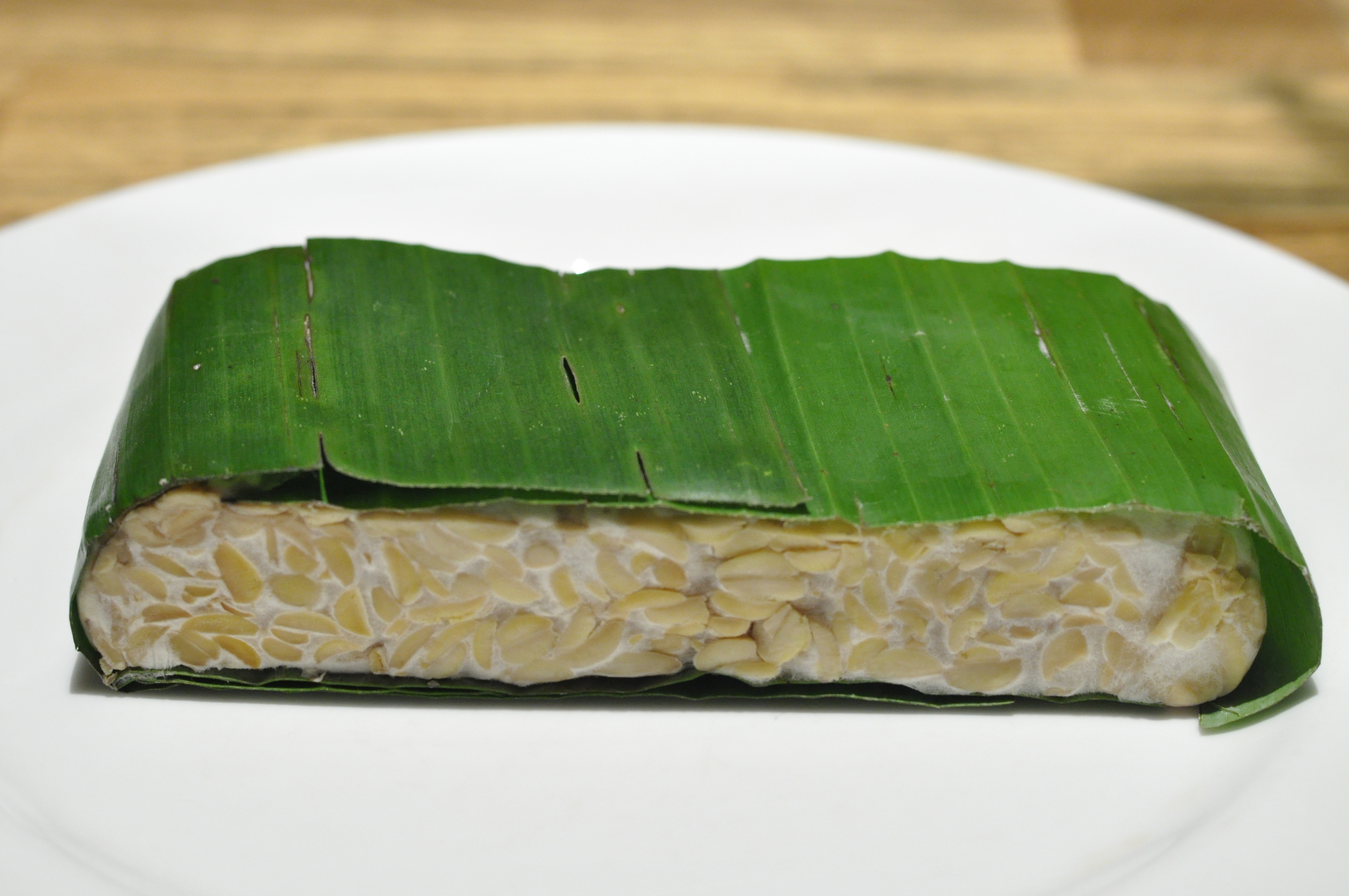 インドネシアの大豆発酵食品であるテンペ